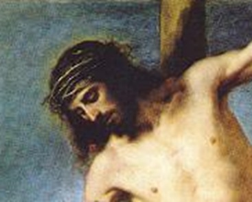 El lienzo representa a San Francisco de Asís abrazando a Cristo crucificado.